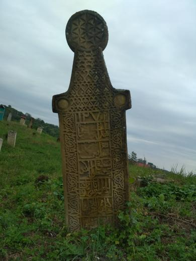 Могила Хозы Мамаева в селении Гендерген